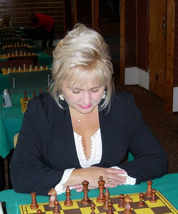 Małgorzata Wiese-Jóźwiak, Bydgoszcz 2006